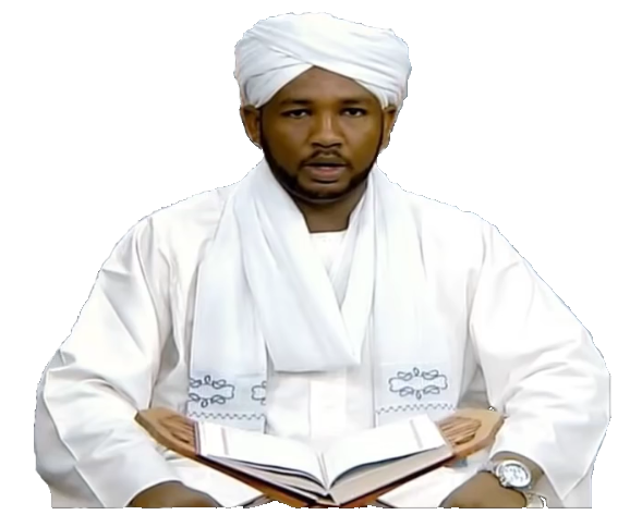 الزين محمد أحمد قارئ سوداني وامام مسجد السيدة سنهوري